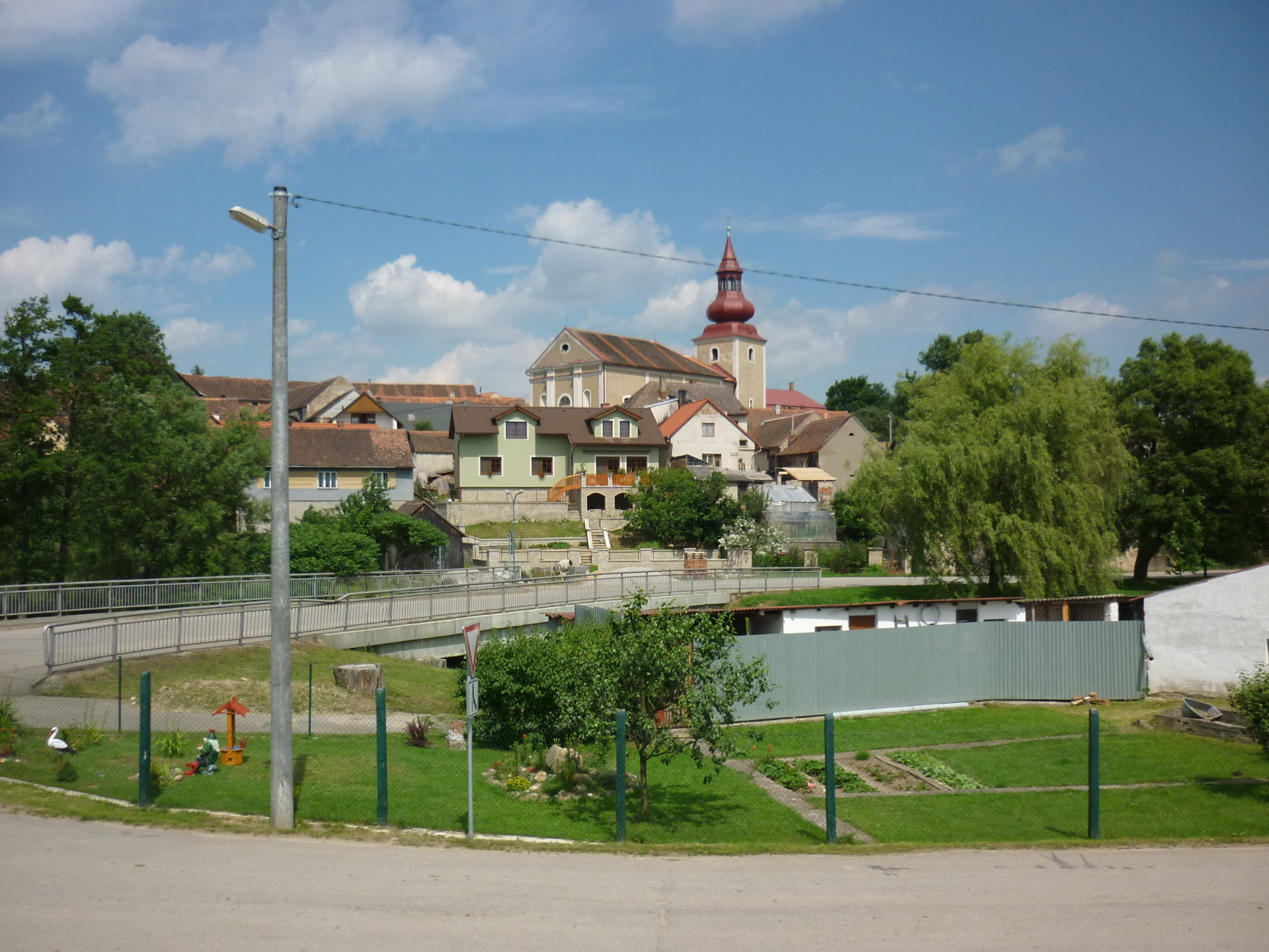 Radkov - Kostel sv. Bartoloměje